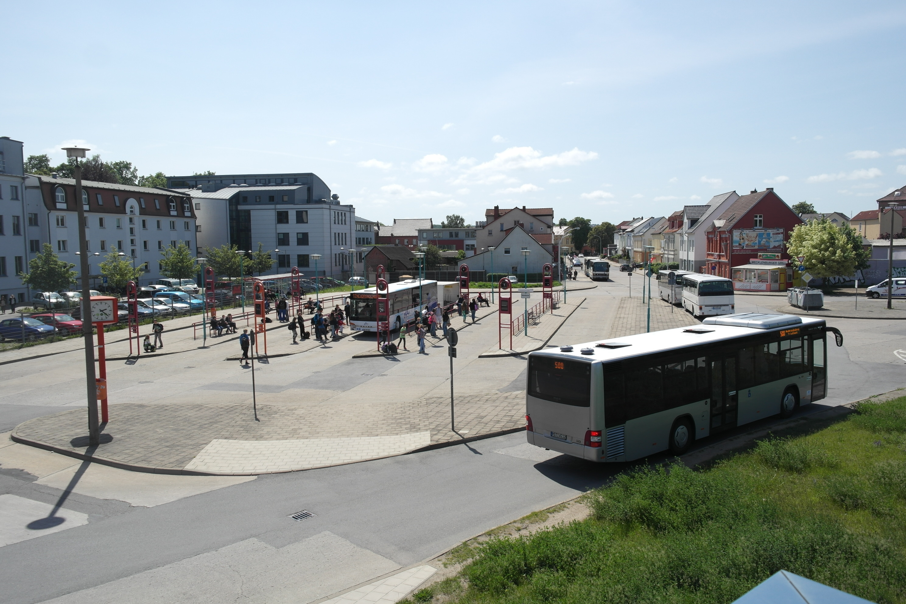 Busbahnhof am Bahnhof Neubrandenburg